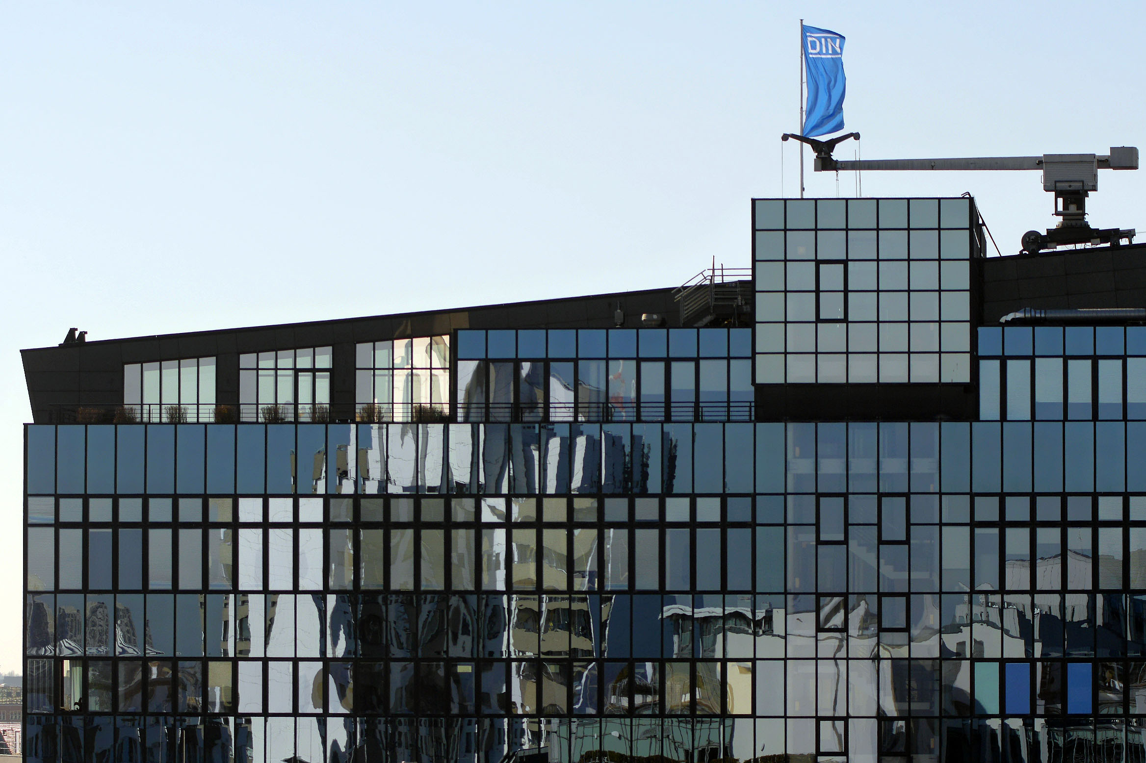 DIN-Gebäuse in Berlin-Tiergarten von Osten aus gesehen